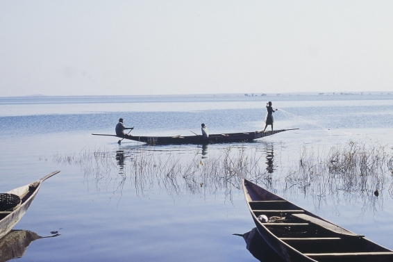 Lac du barrage de Sélingué au Mali Photo de Olivier EPRON